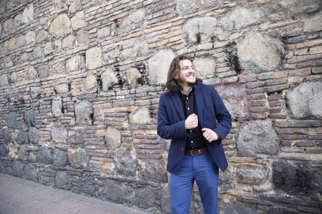 Jairo River, integrante de Voces de Paz y Reconciliación